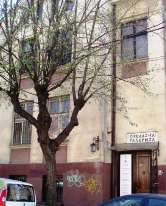 Фотографија УЛУС-ове продајне галерије у Београду Косанчићев венац